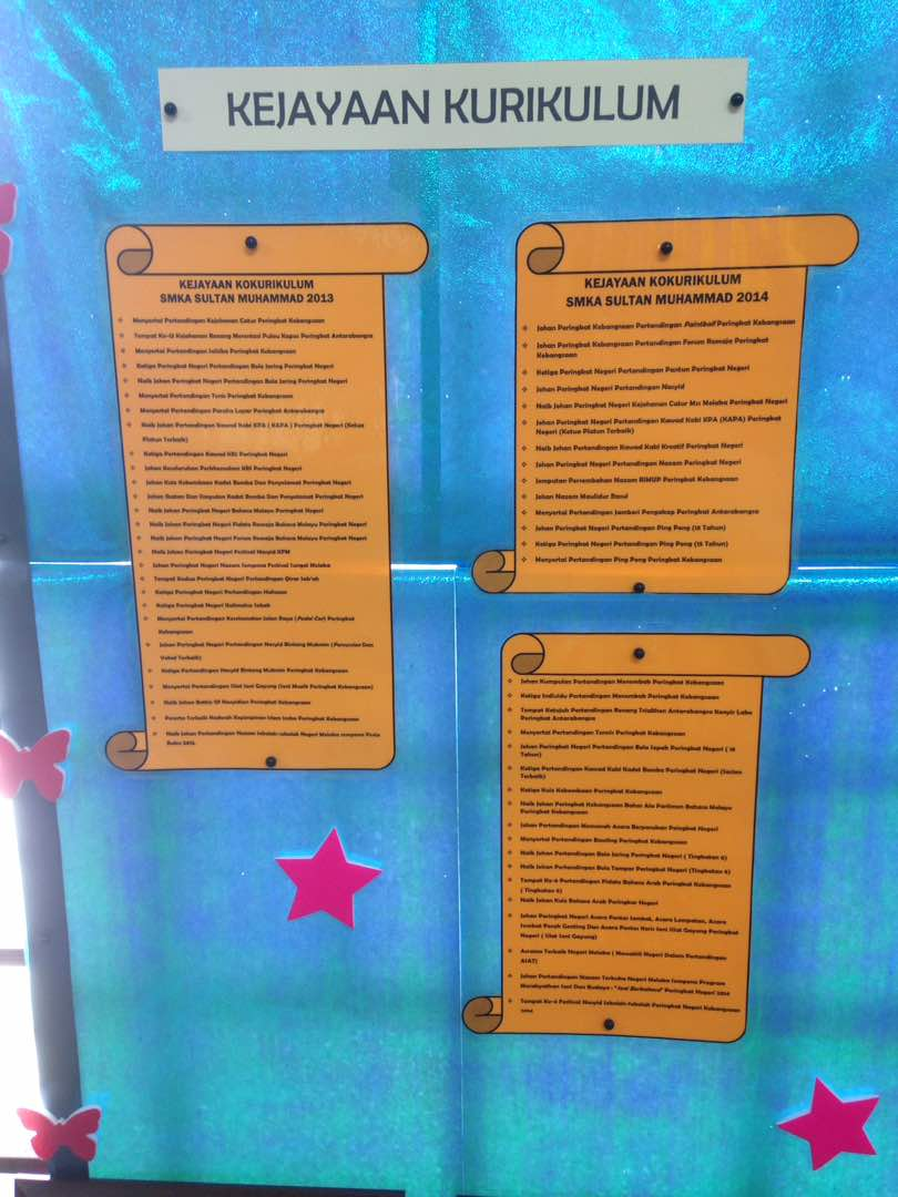 Kejayaan Kurikulum tahun 2013-2017